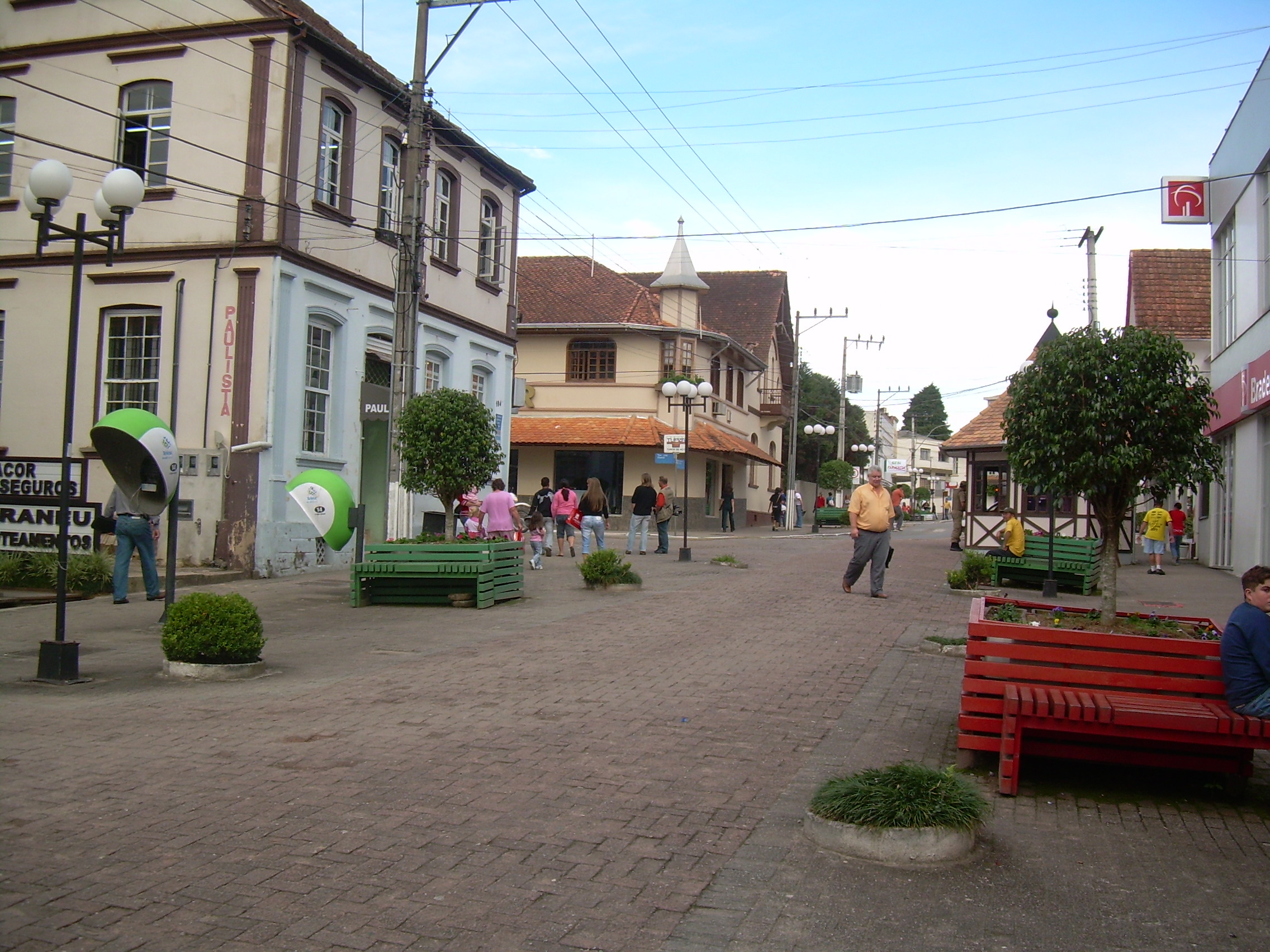 São bento do sul/SC no outono.